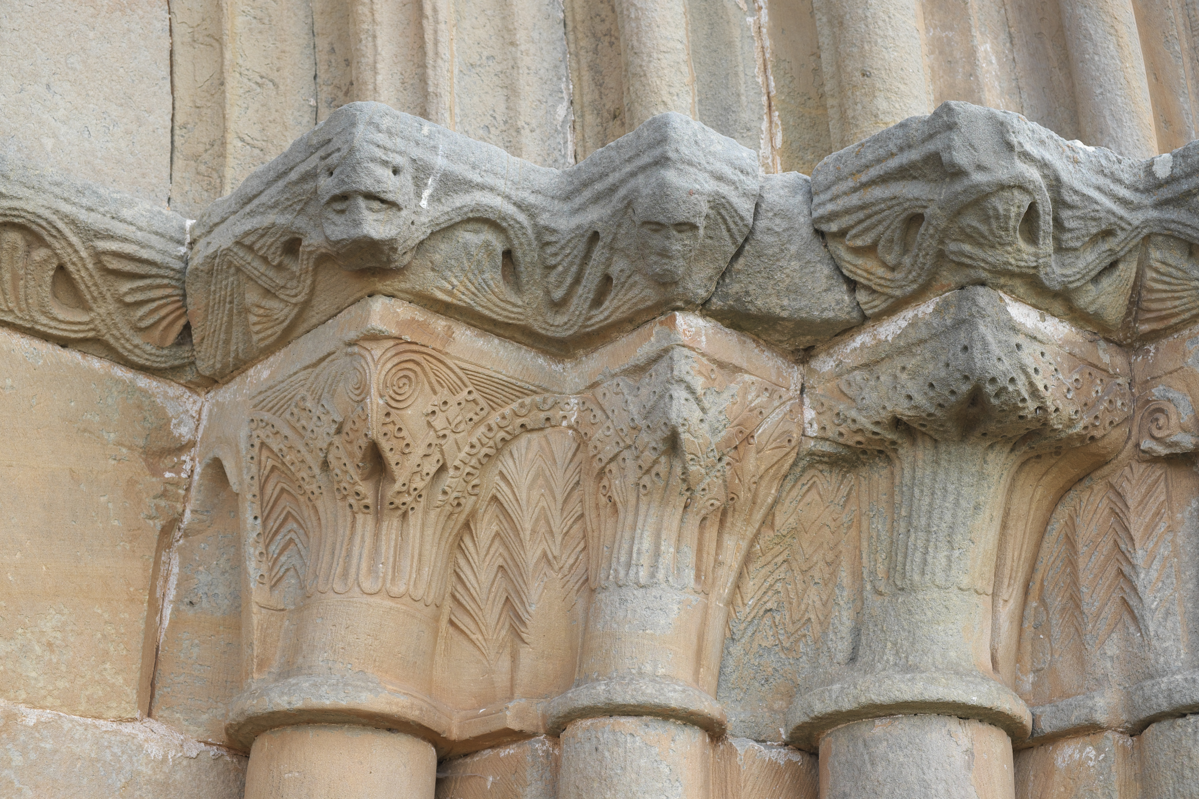 Ermita Santa Eulalia in Barrio de Santa María (Aguilar de Campoo) in der Provinz Palencia (Kastilien-León/Spanien), Kapitelle und Kämpfer mit Relief am Portal